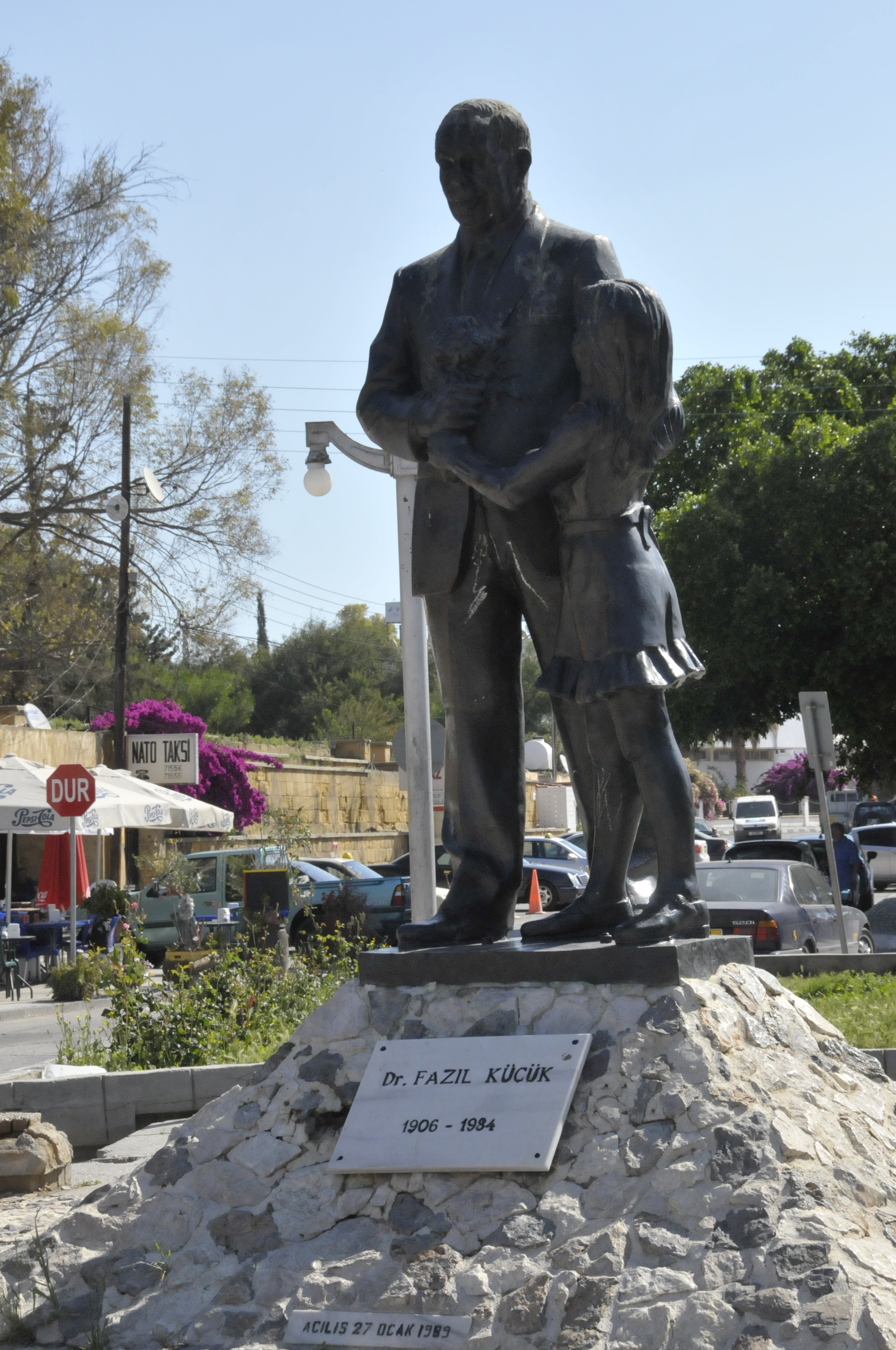 Nicosia-Nord, Standbild von Fazıl Küçük